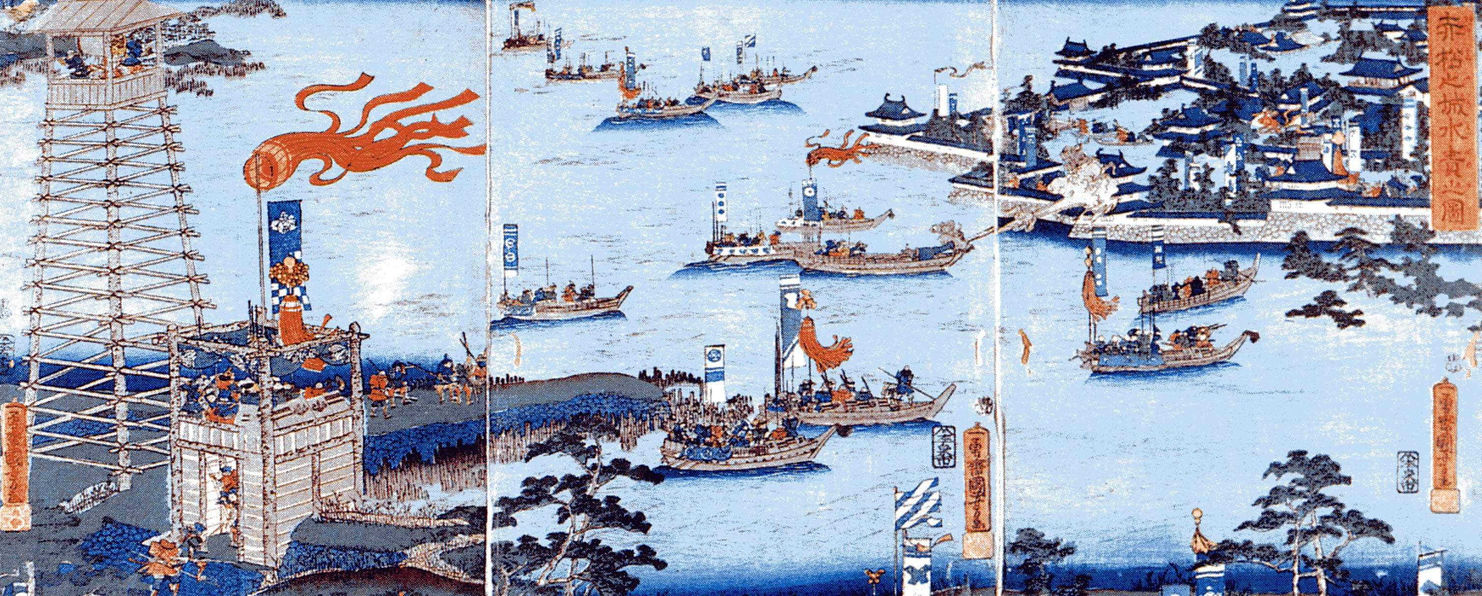 一勇斎国芳画「赤松之城水責之図」、3枚揃大判錦絵 ［説明］江戸時代の錦絵図。高松城を赤松城として記されている。東京都立中央図書館所蔵